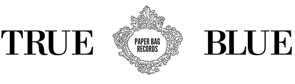 Logo del álbum tributo True Blue, publicado por Paper Bag Records.